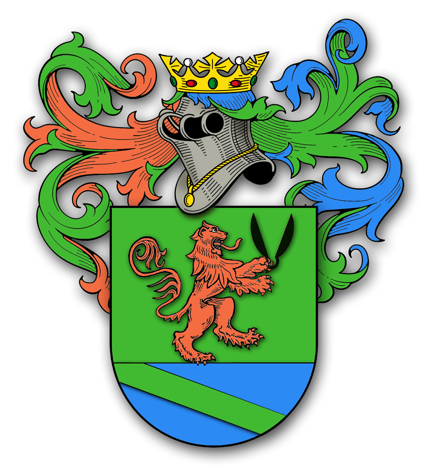 Brasão da família Sartori de Enego e Vicenza